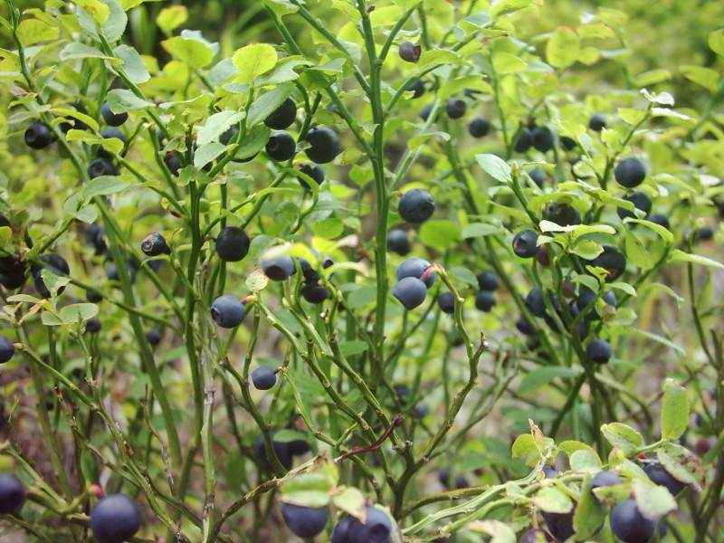 Bilberies